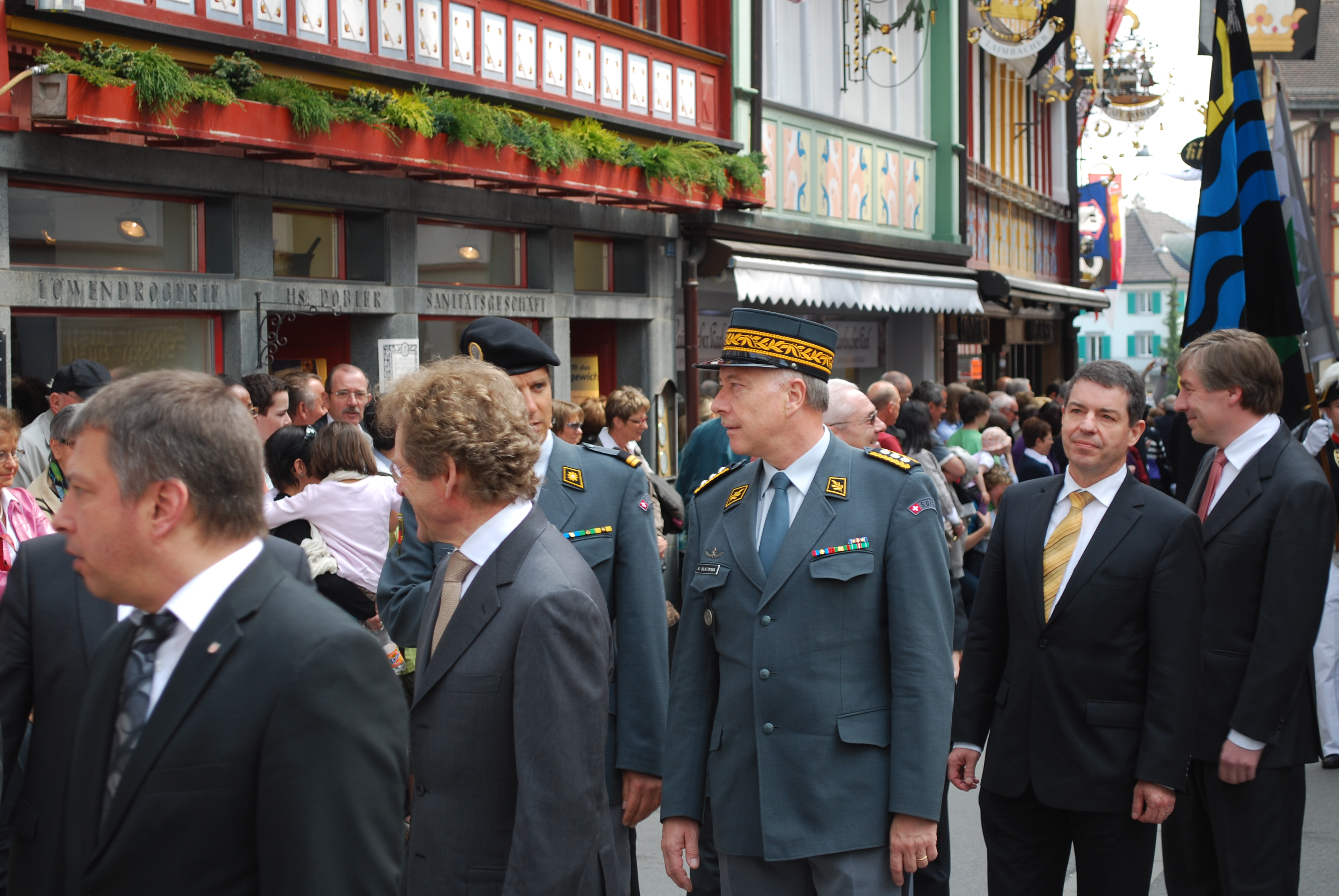 Ehrengäste an der Landsgemeinde in Appenzell Innerrhoden, in der Mitte Korpskommandant André Blattmann